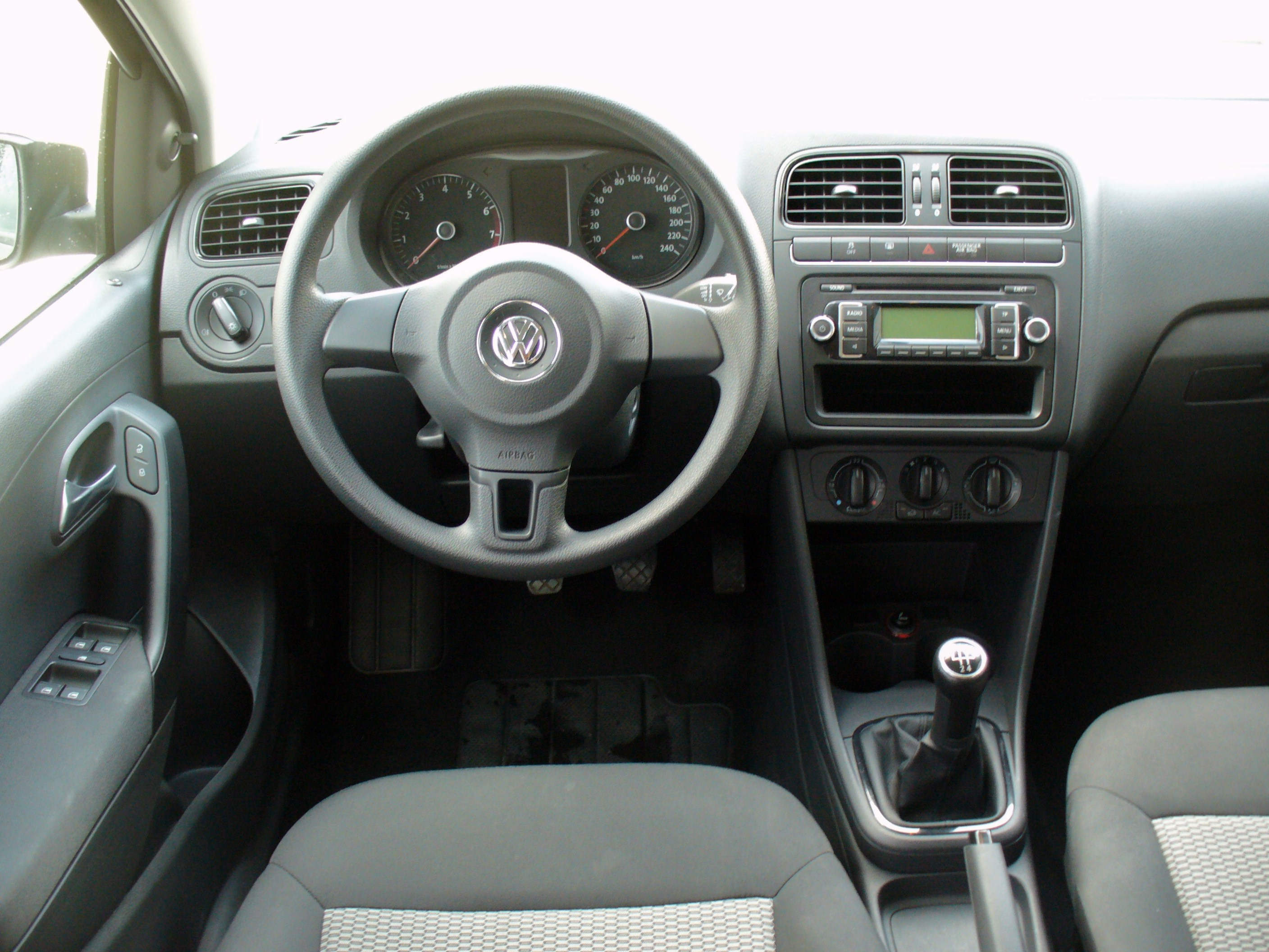 VW Polo V